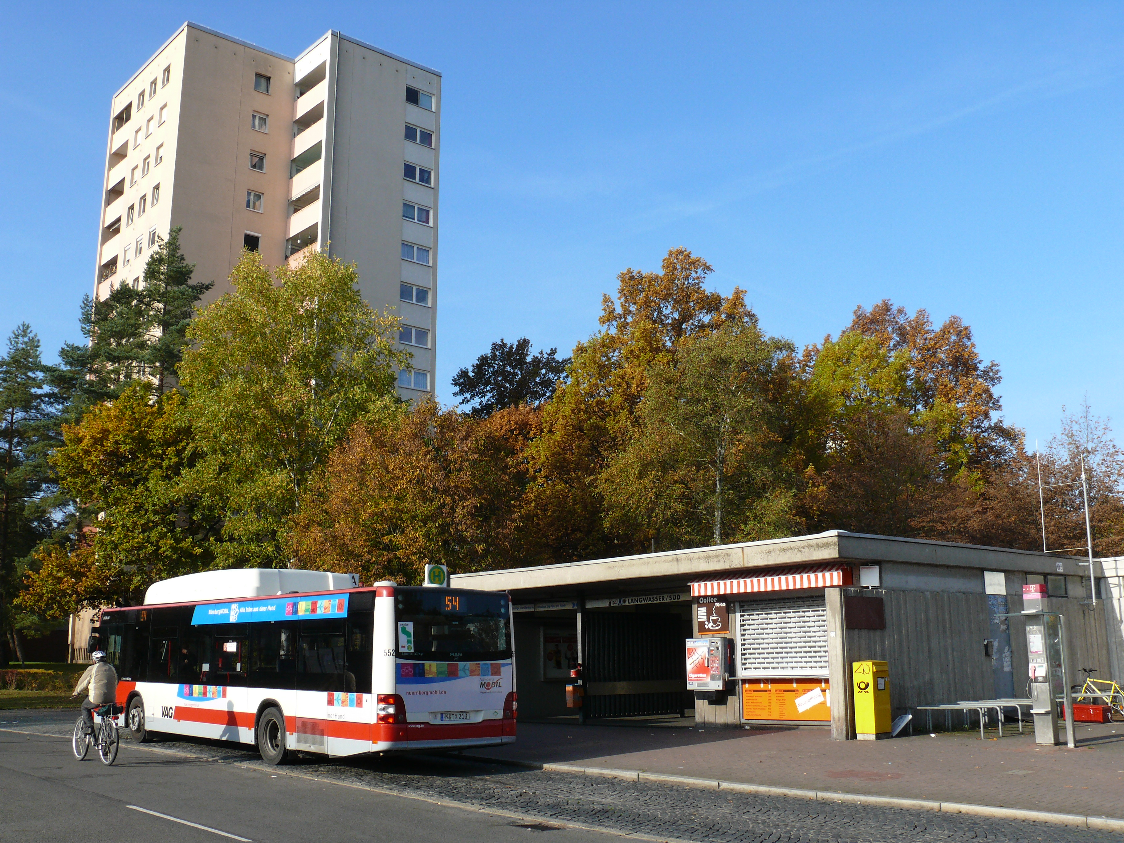 Stadtbuslinie 54 an der Haltestelle über dem U-Bahnhof Langwasser Süd in Nürnberg.